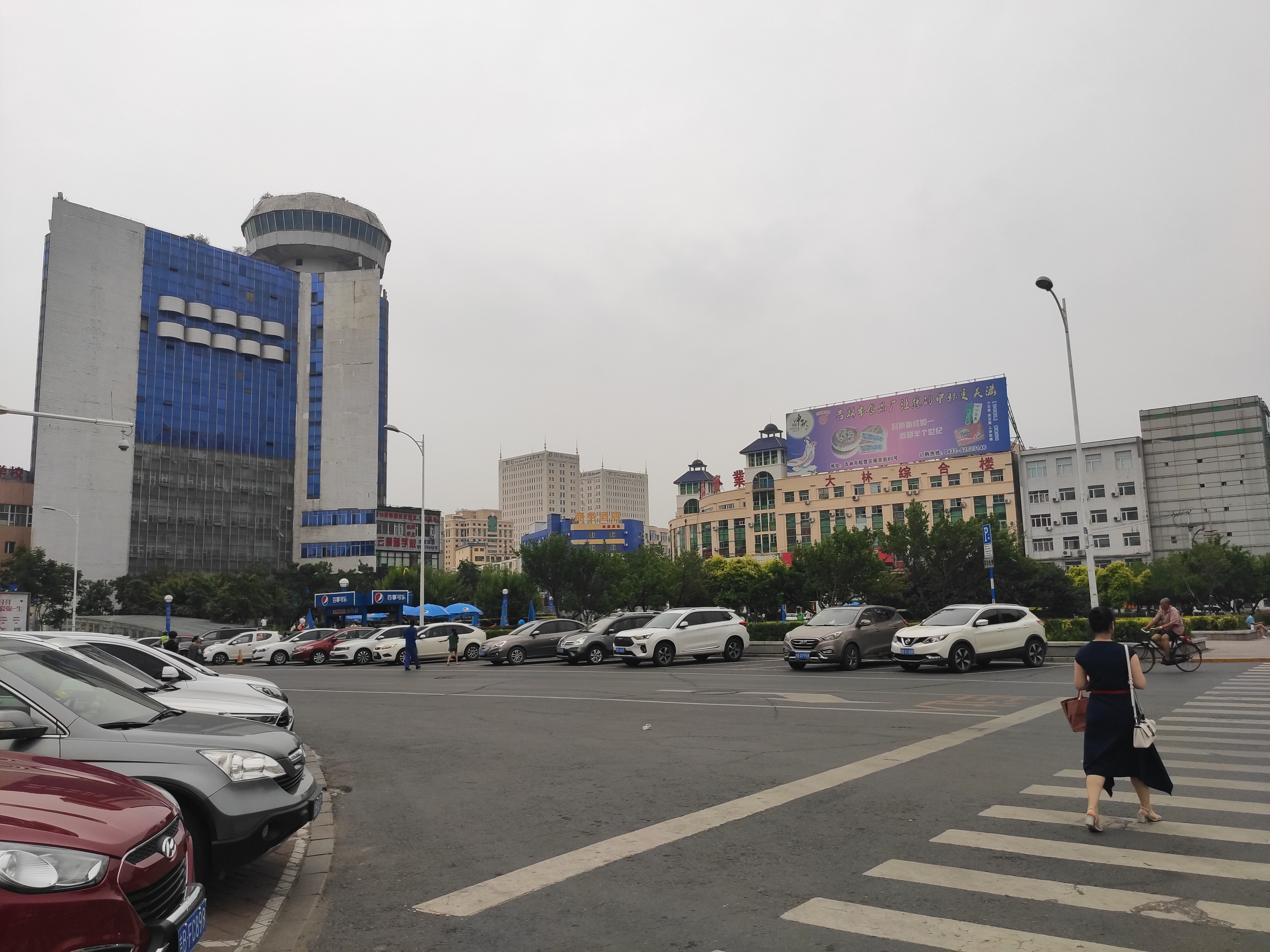 吉林市大东门广场